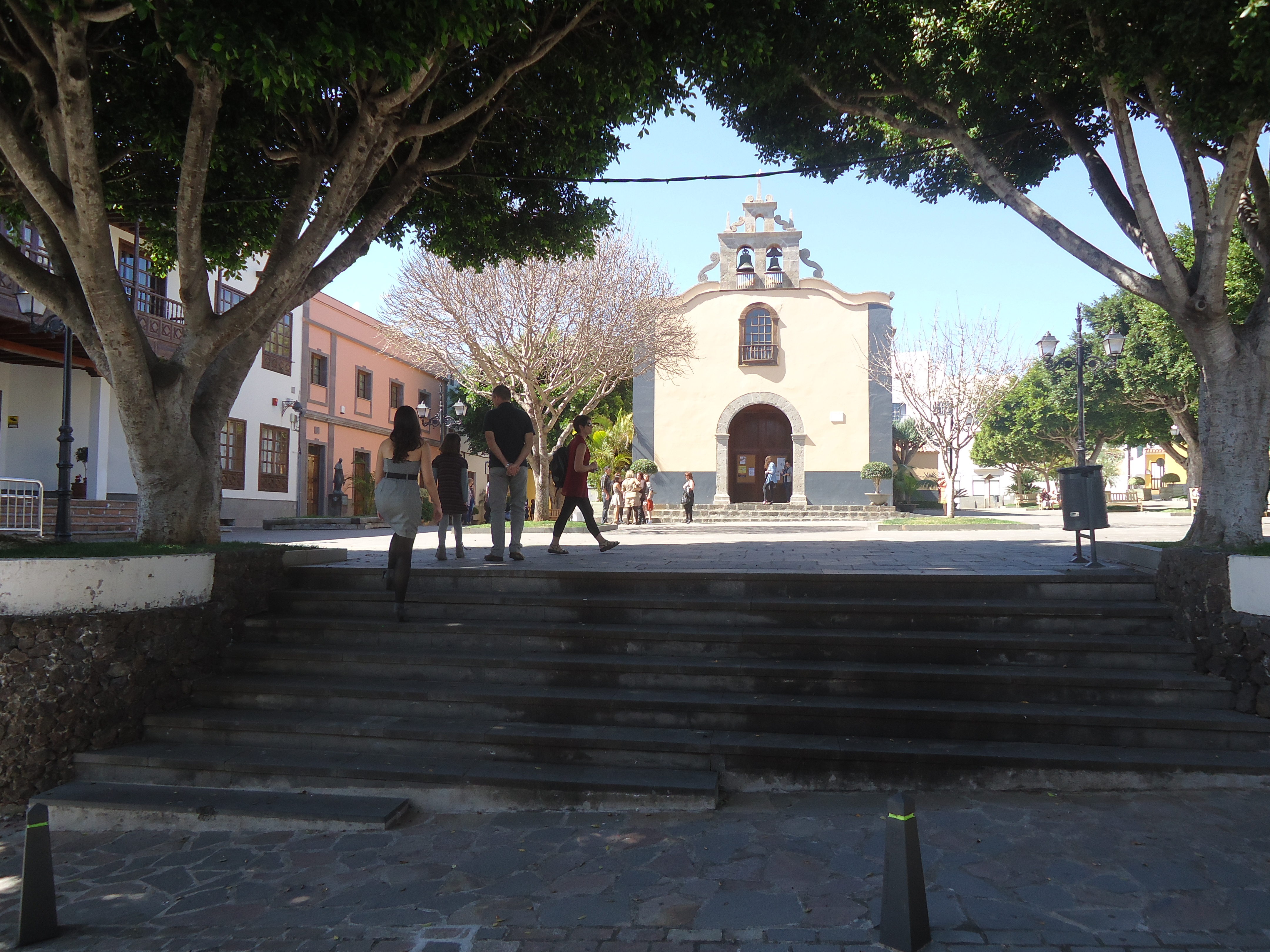 Iglesia del caso de Arona. Santa Cruz de Tenerife